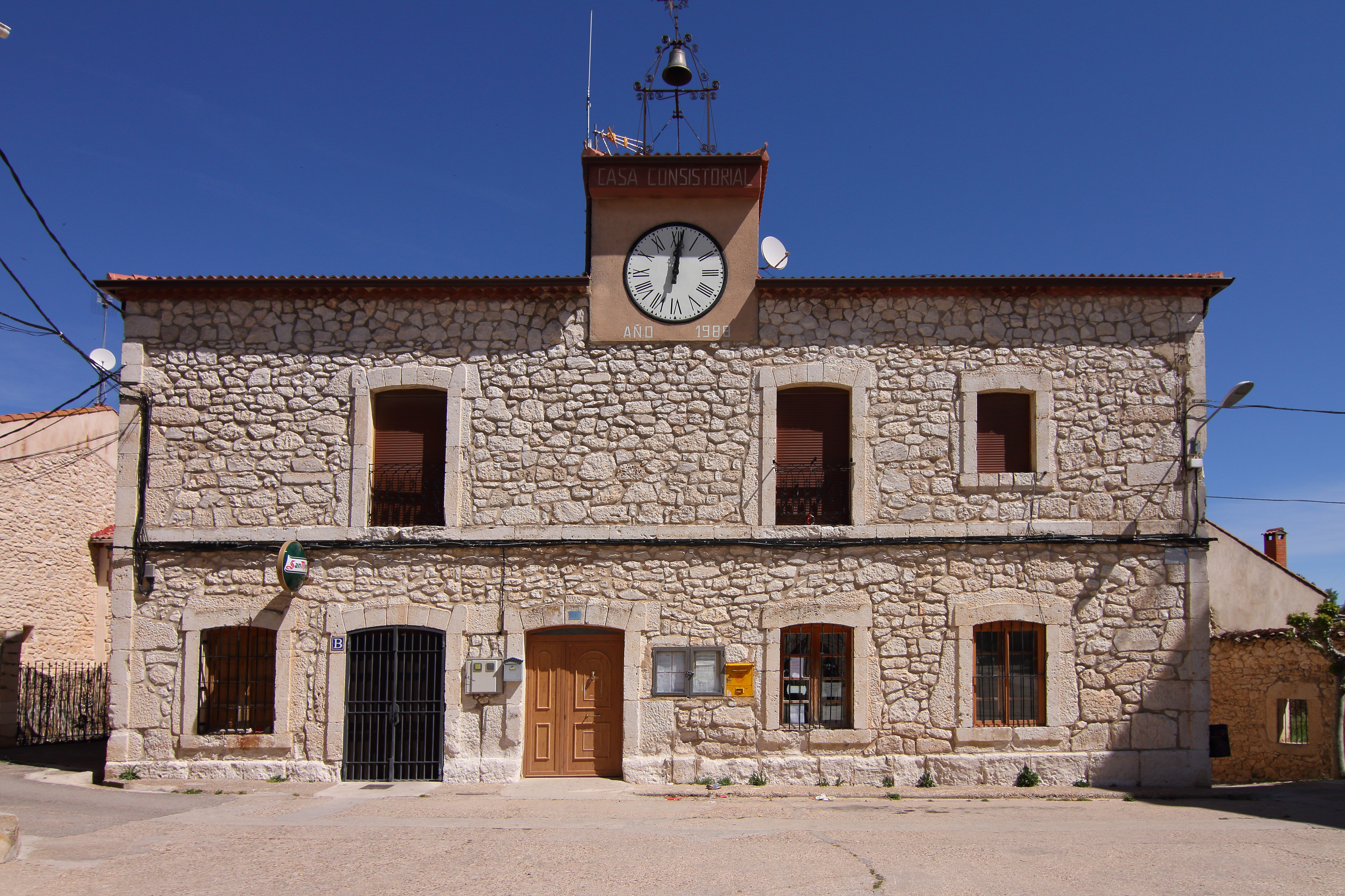 Fuentemolinos, Casa Consistorial